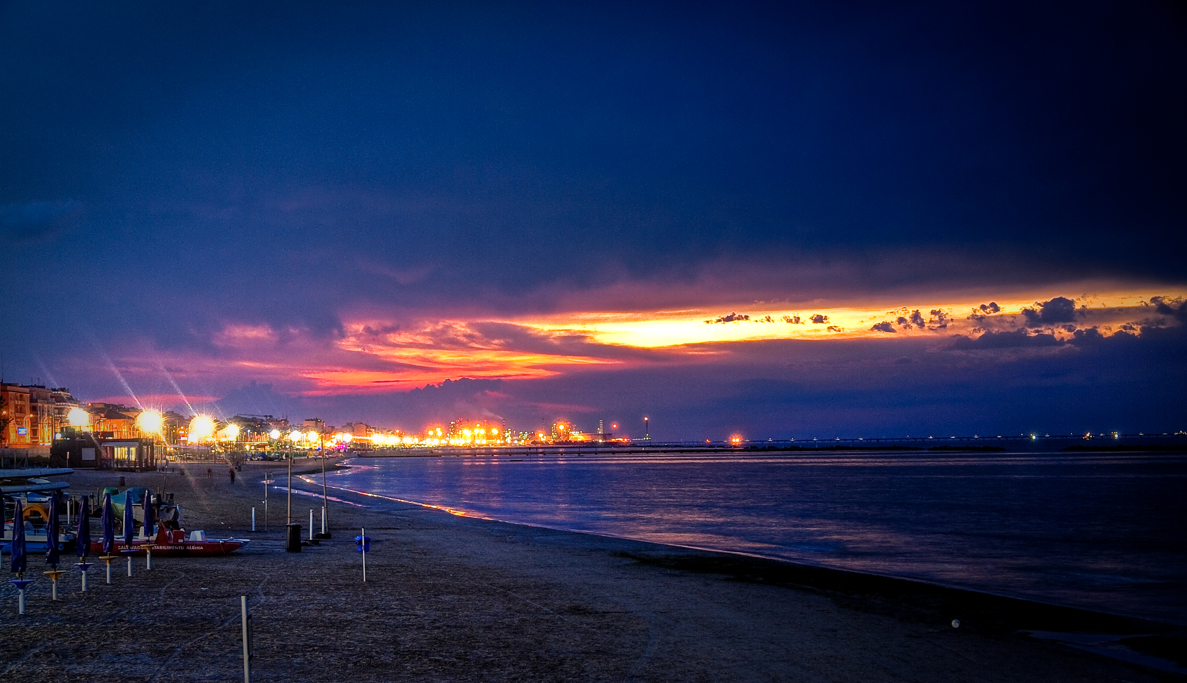 Costa di Falconara Marittima al tramonto.